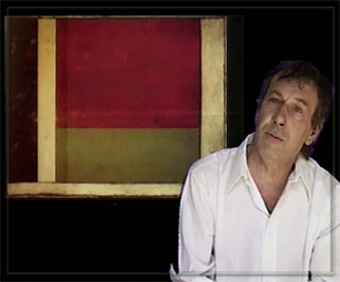 Portrait de Jean-Pierre Pincemin